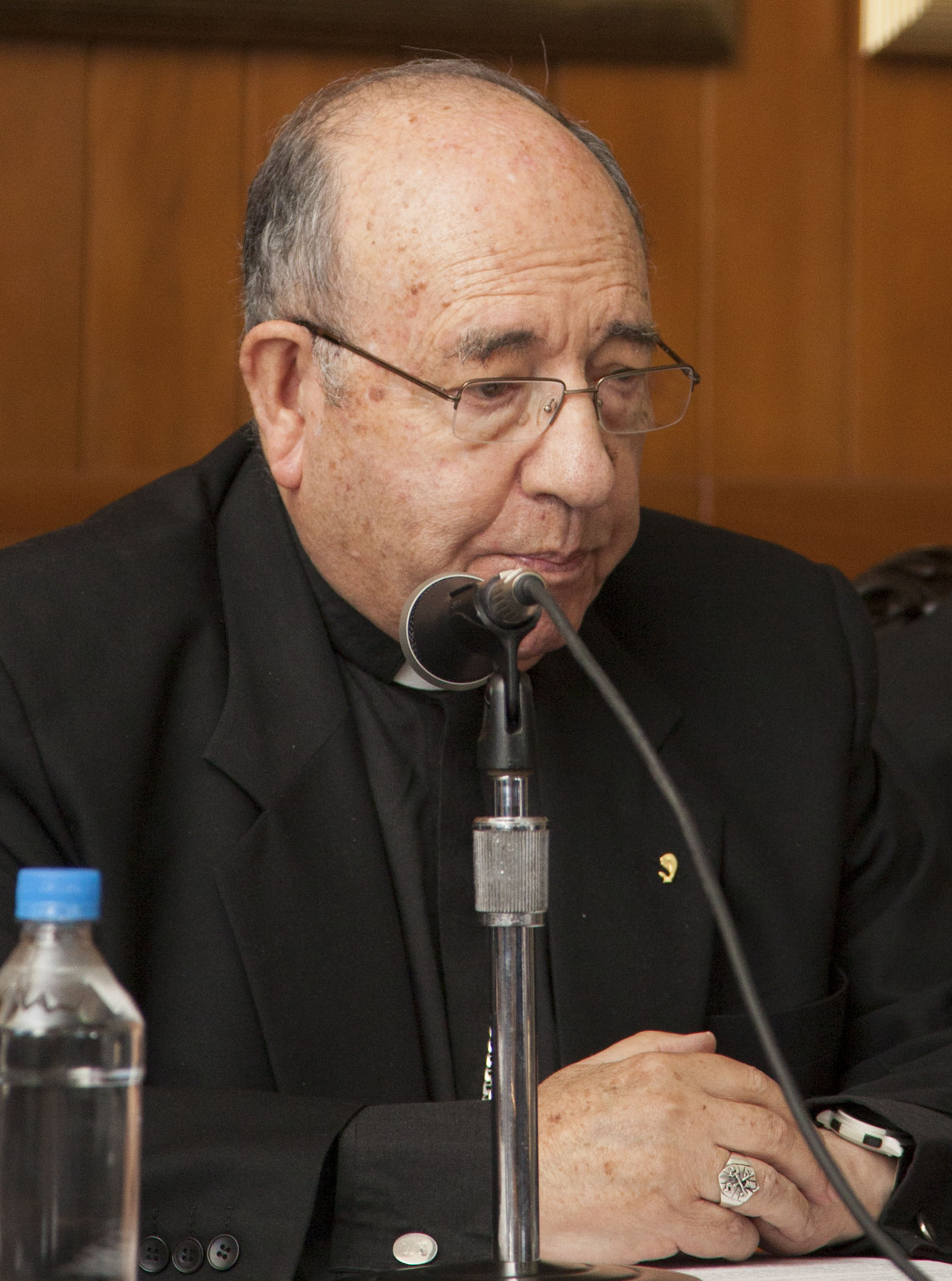 Quito Ecuador, 08 de mayo de 2015. En la “Conferencia Episcopal Ecuatoriana”, el Cardenal Raúl Vela y Ricardo Patiño, Ministro de Relaciones Exteriores y Movilidad Humana, socializan la agenda que cumplirá el Papa Francisco en Ecuador. Carlos Pozo Albán / Cancillería del Ecuador